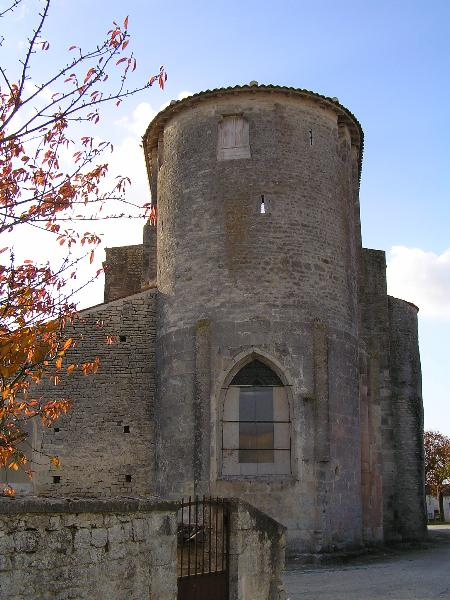 église fortifiée de Brie-sous-Matha